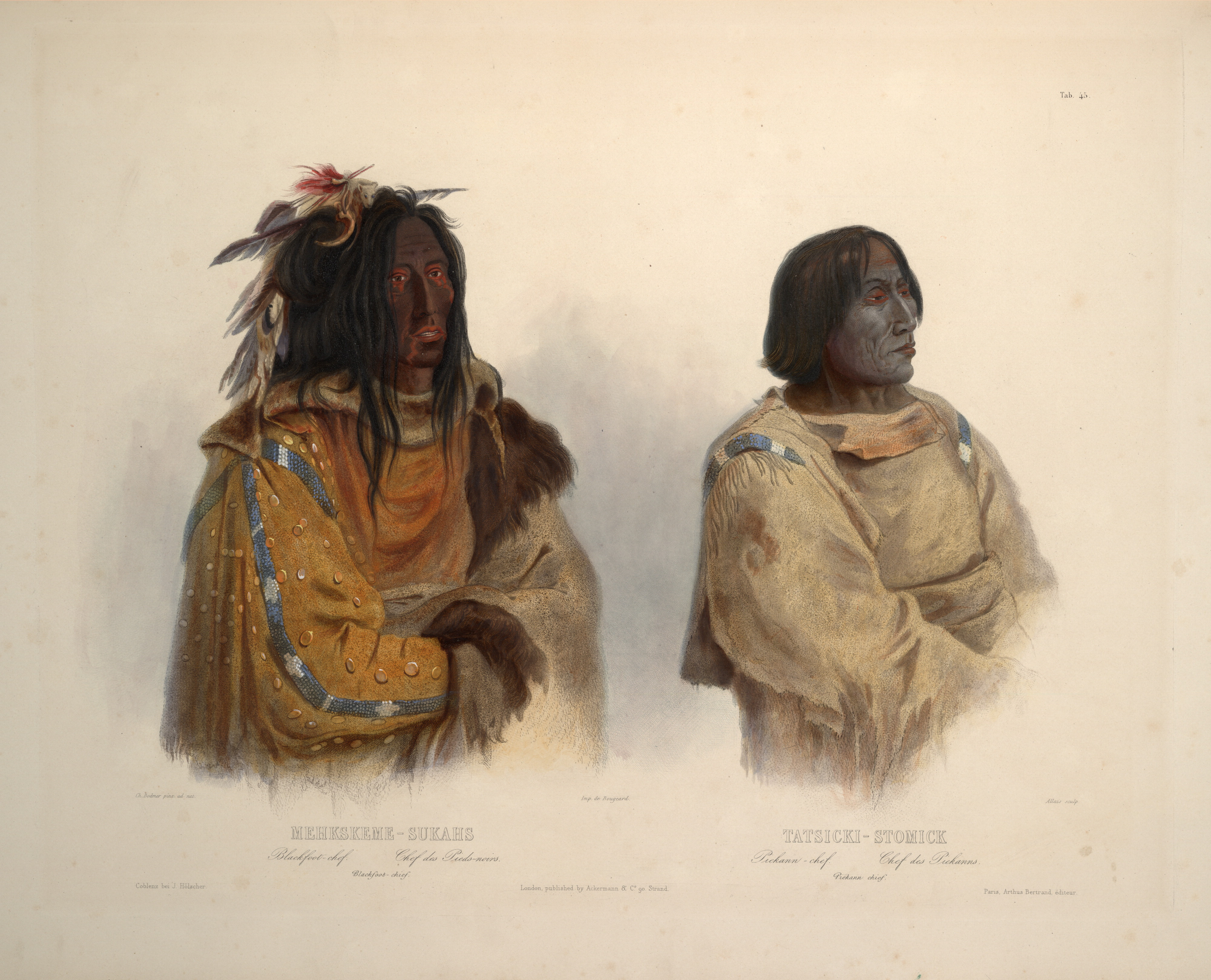 Blackfoot chief and Peikann chief